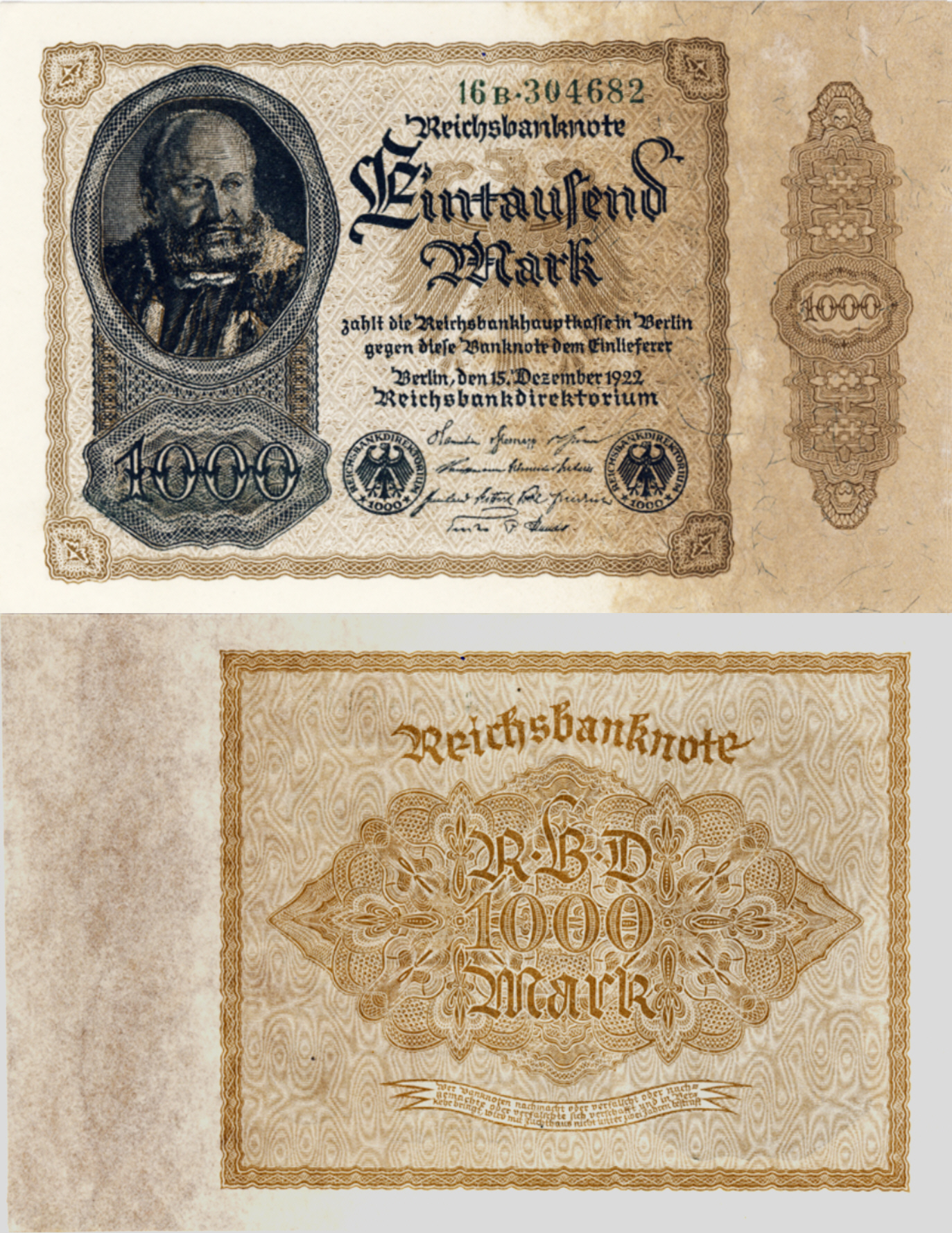 1000 Mark (never issued)